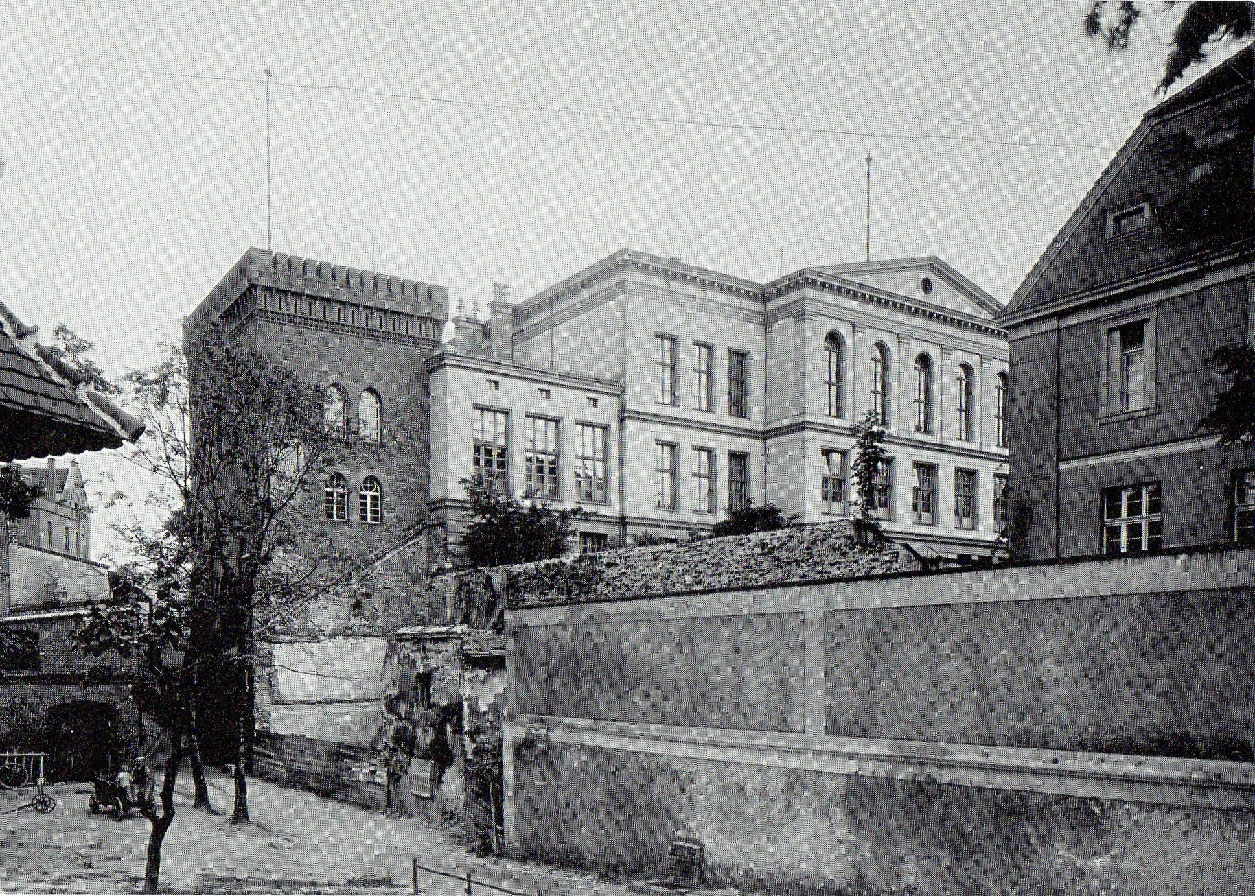 Zamek Gorny w Opolu